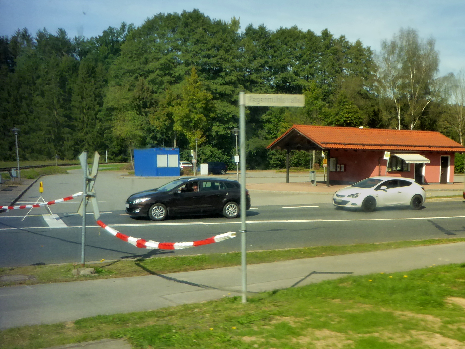 Während des Probebetriebs der Bahn muss der technisch ungesicherte Übergang an der Regenmühlstraße in Teisnach von Hand abgesperrt werden.